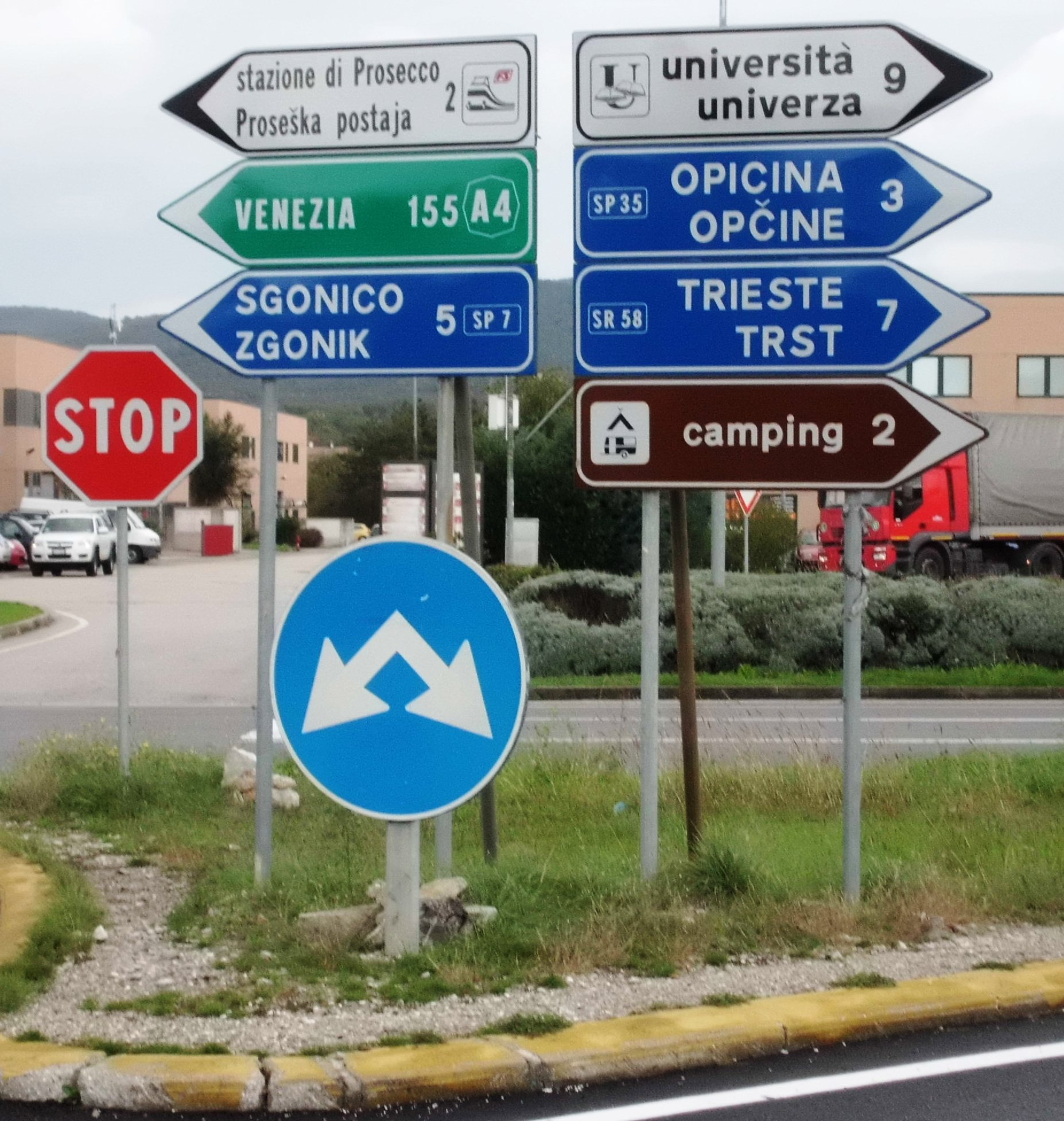 Segnaletica stradale presso Prosecco (TS)